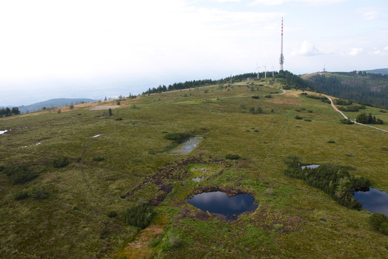 Die Hochebene der Hornisgrinde